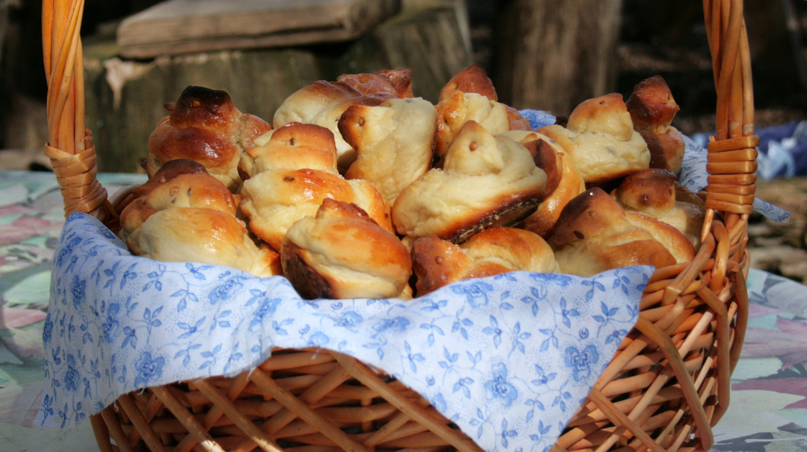 Печенье «Жаворонки» на празднике Сороки или Жаворонки. Родовое экопоселение «Кореньские родники» в Шебекинском районе. 24 марта 2012 г.